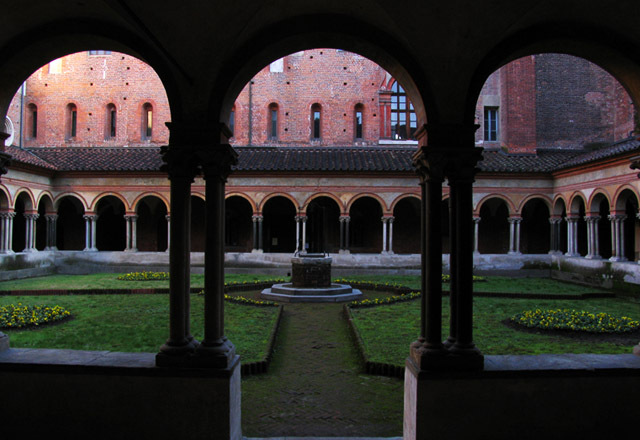 Abbazia di Sant'Andrea - Vercelli